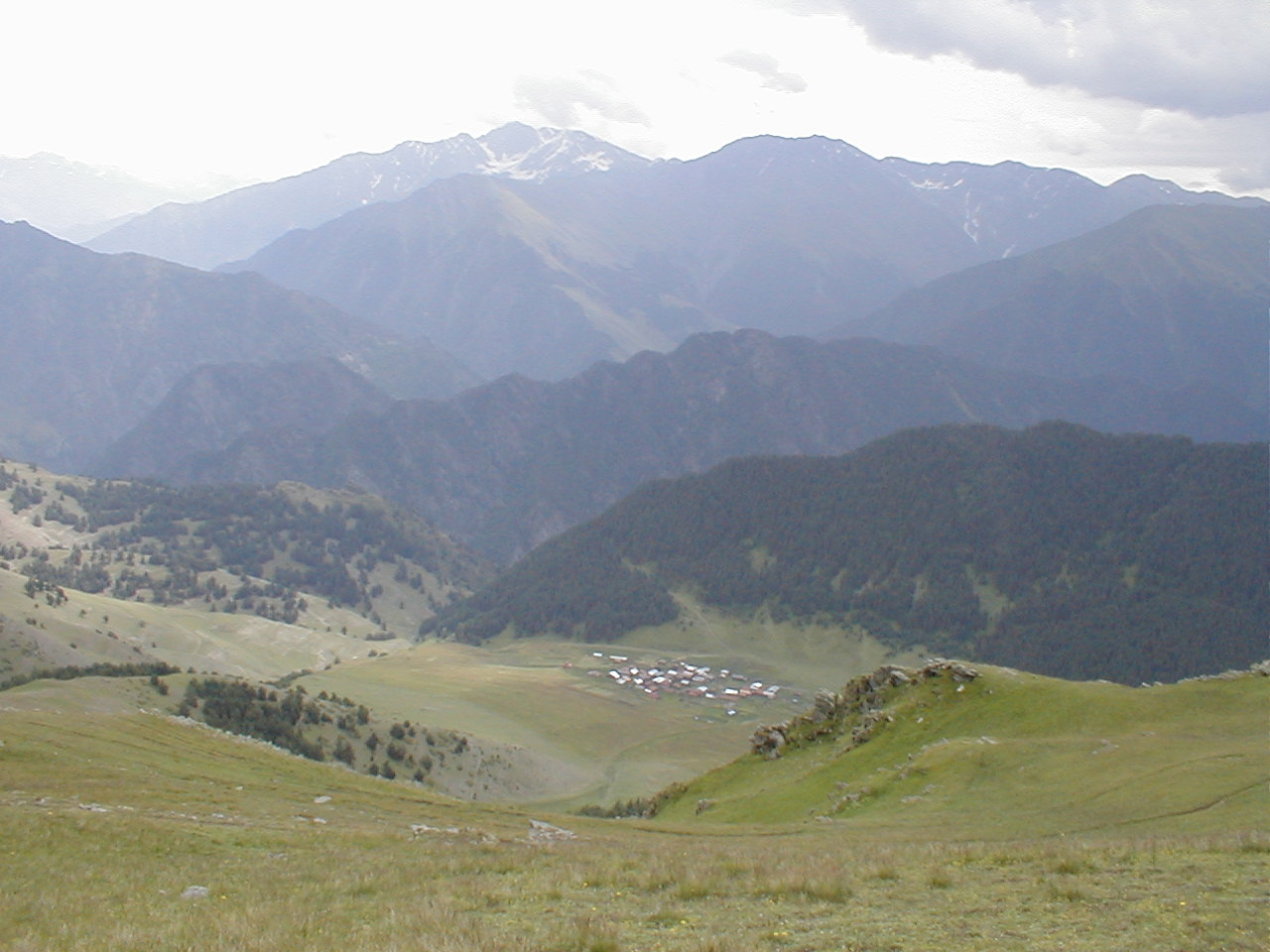 Diklo 2684 m1010053